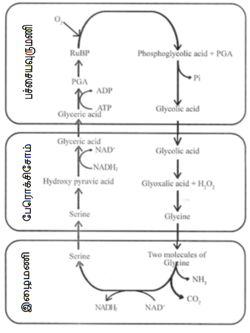 ஒளிச்சுவாசமும் பங்கெடுக்கும் புன்னங்கங்களும்.